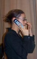 ענת קום, כתבת וואלה! ברנז'ה בשנים 2007-2010, בכנס אילת לעיתונות 2008